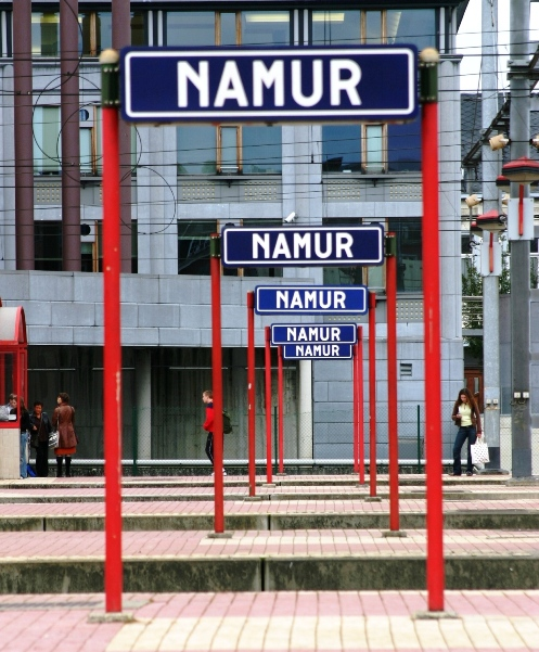 Namur Gare.